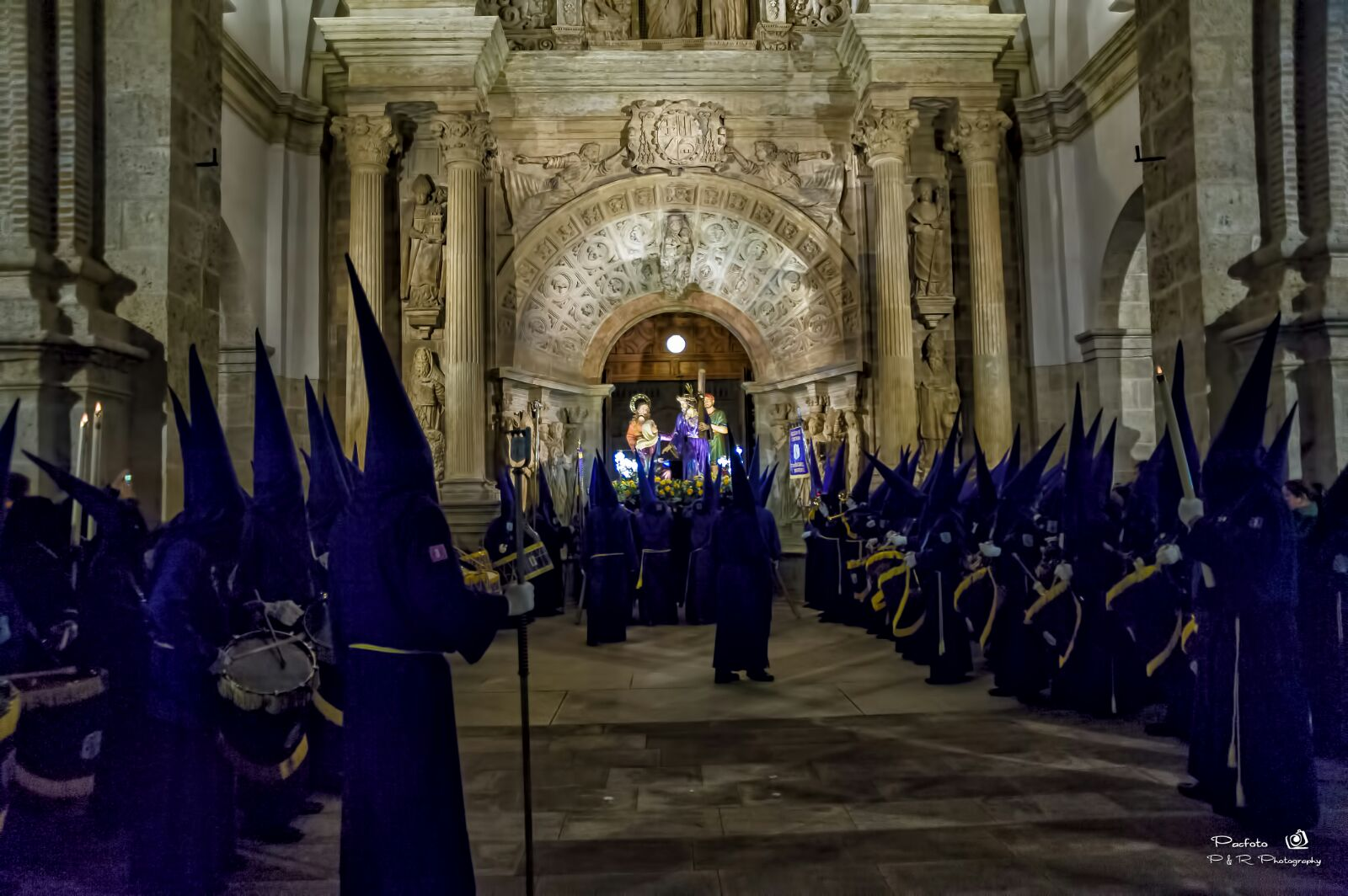 Pórtico de la Catedral de Tarazona, entrada del paso del Nazareno